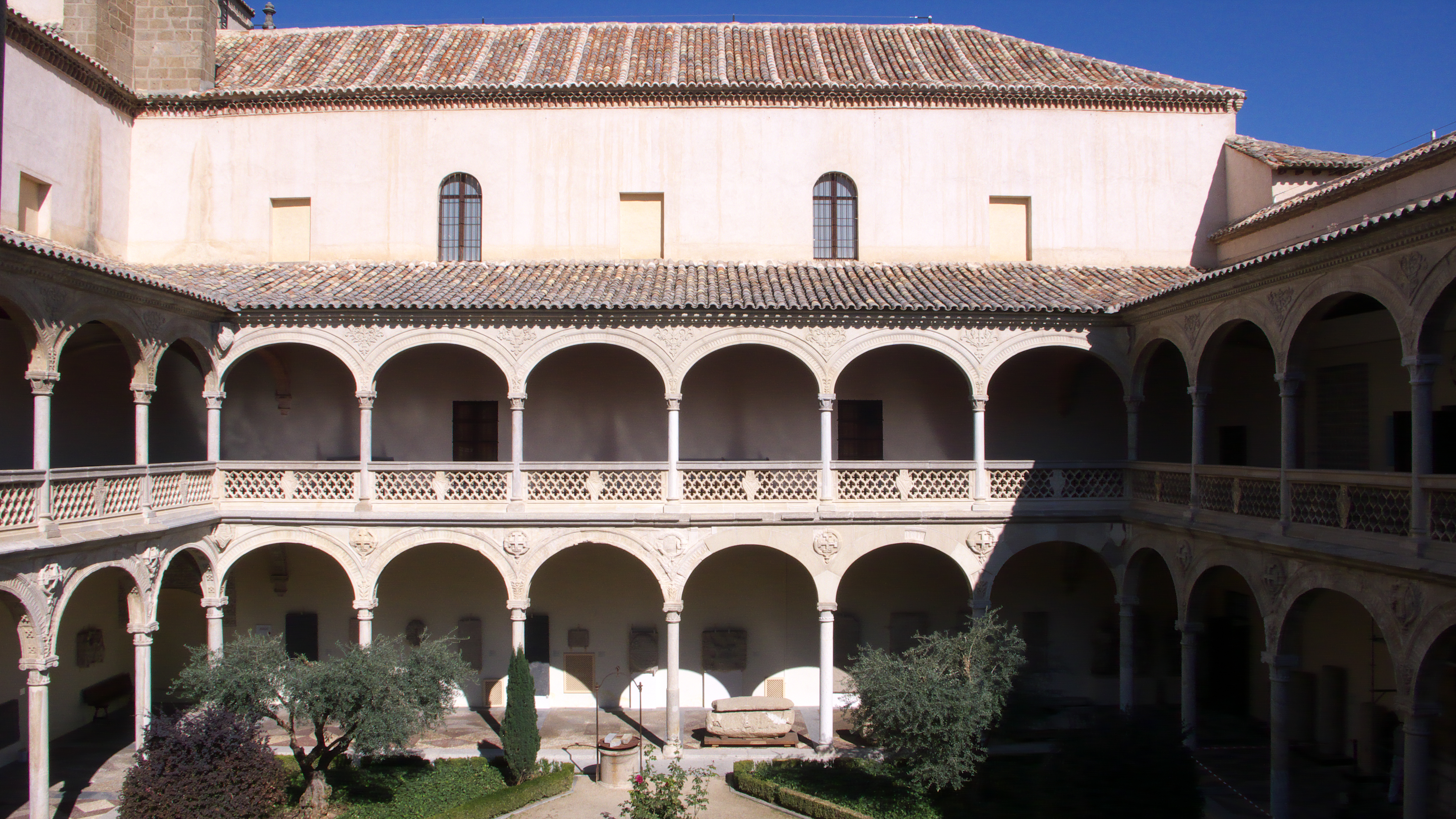 Hospital de la Santa Cruz (1504-1524). Otra obra cumbre de Alonso de Covarrubias.